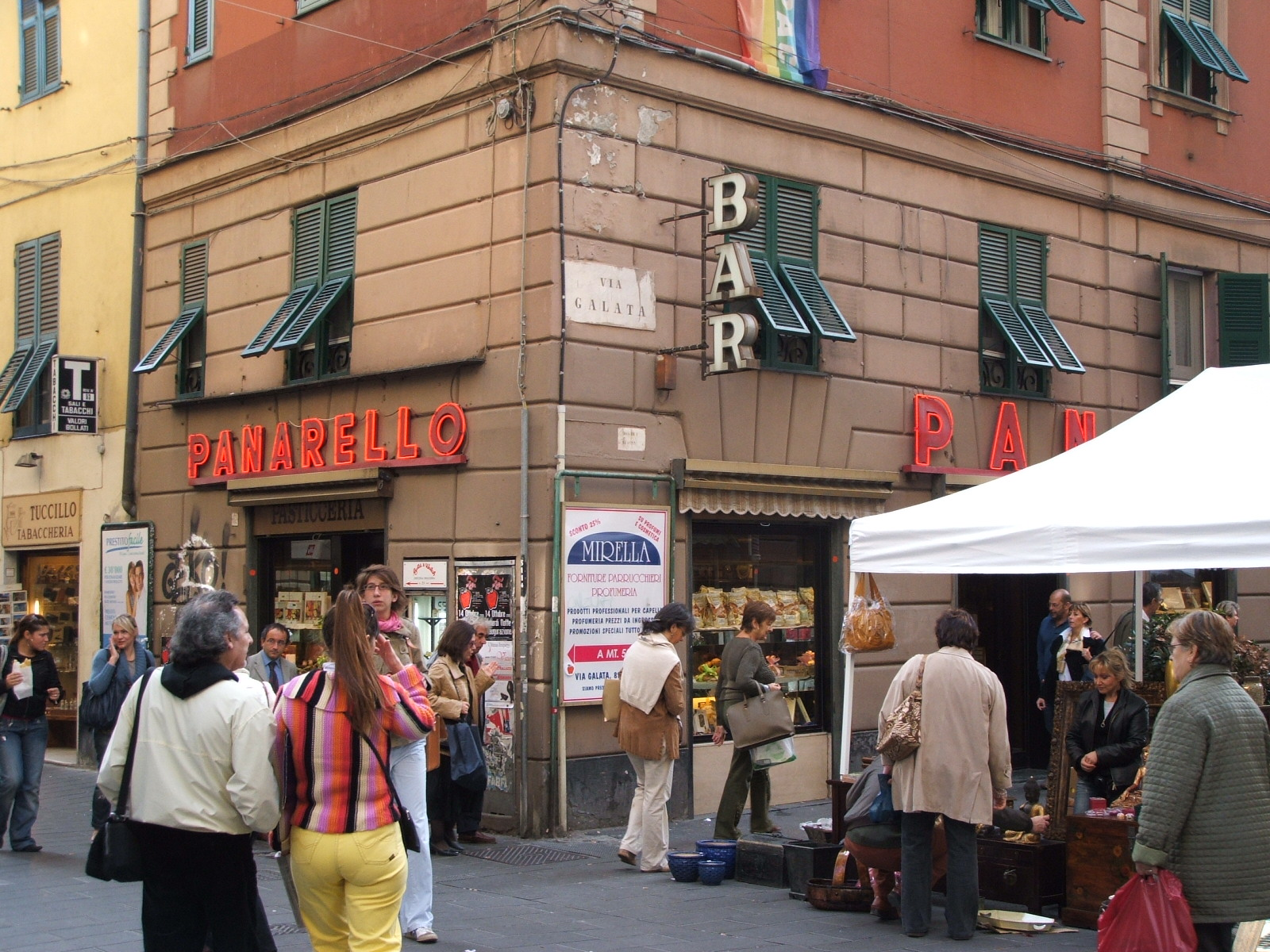 Immagine dalla città di Genova Via Galata - l'antico Bar Panarello